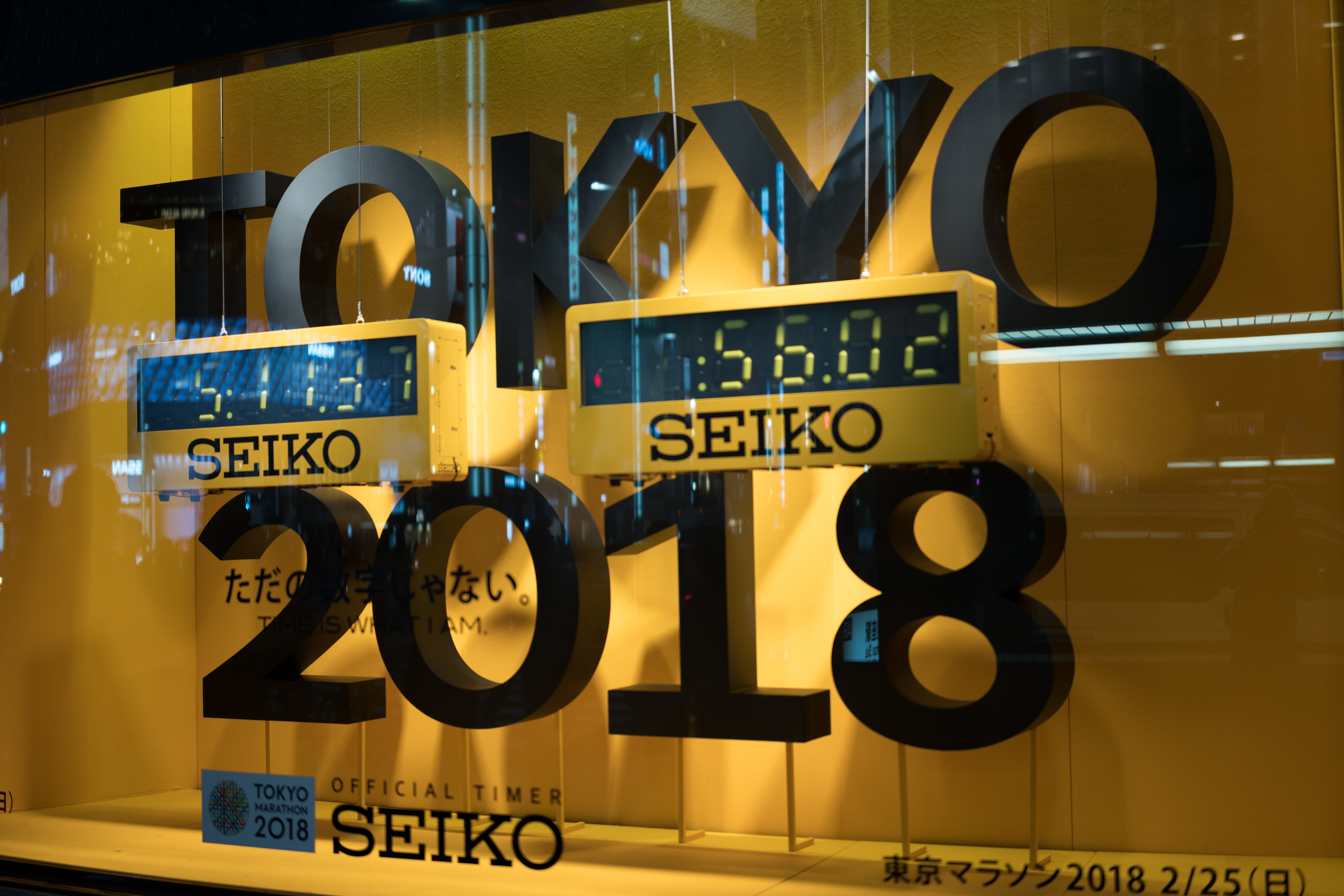 L1000710